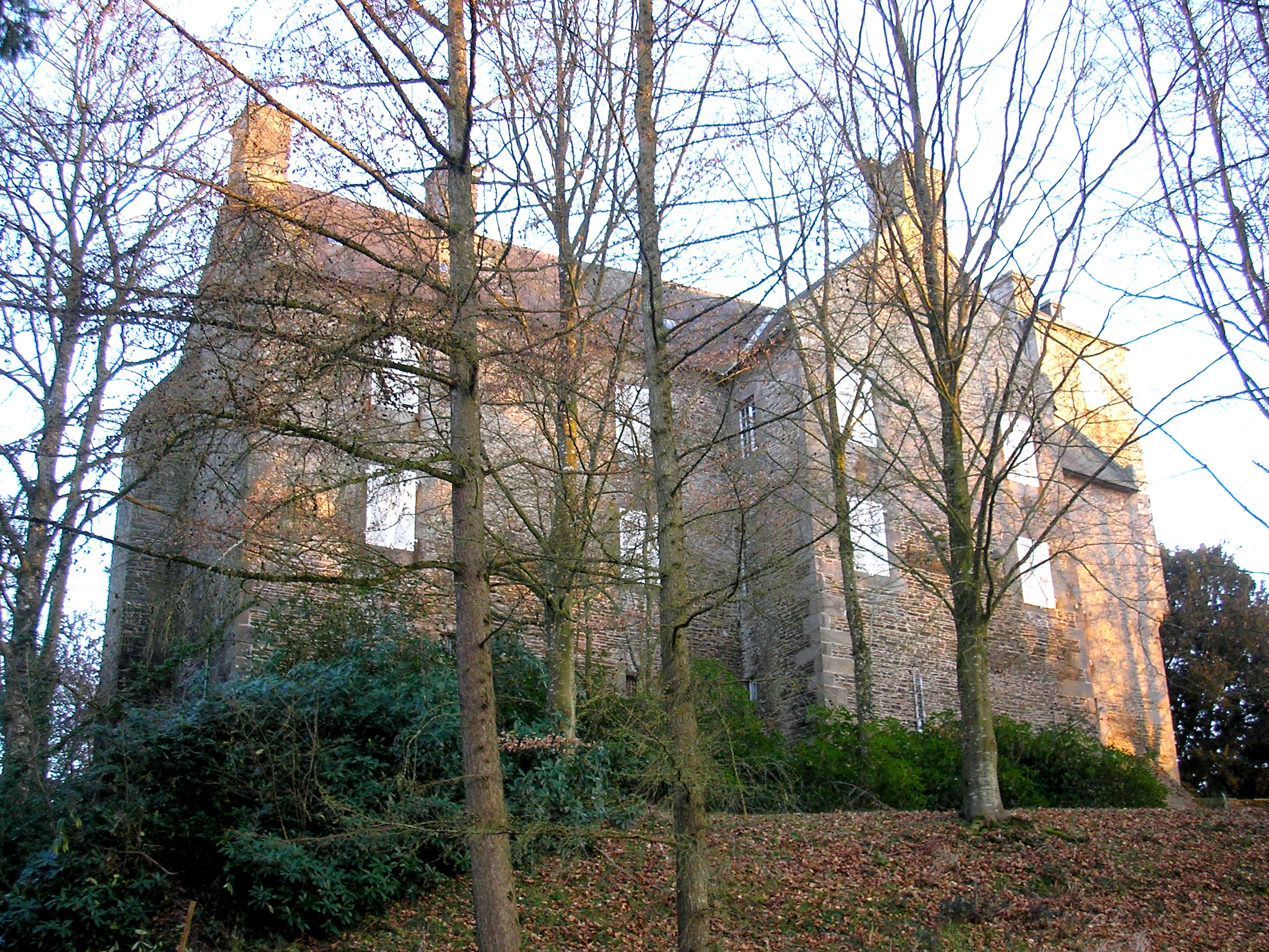 Les Loges-Marchis (Normandie, France). Le château de la Chaize.